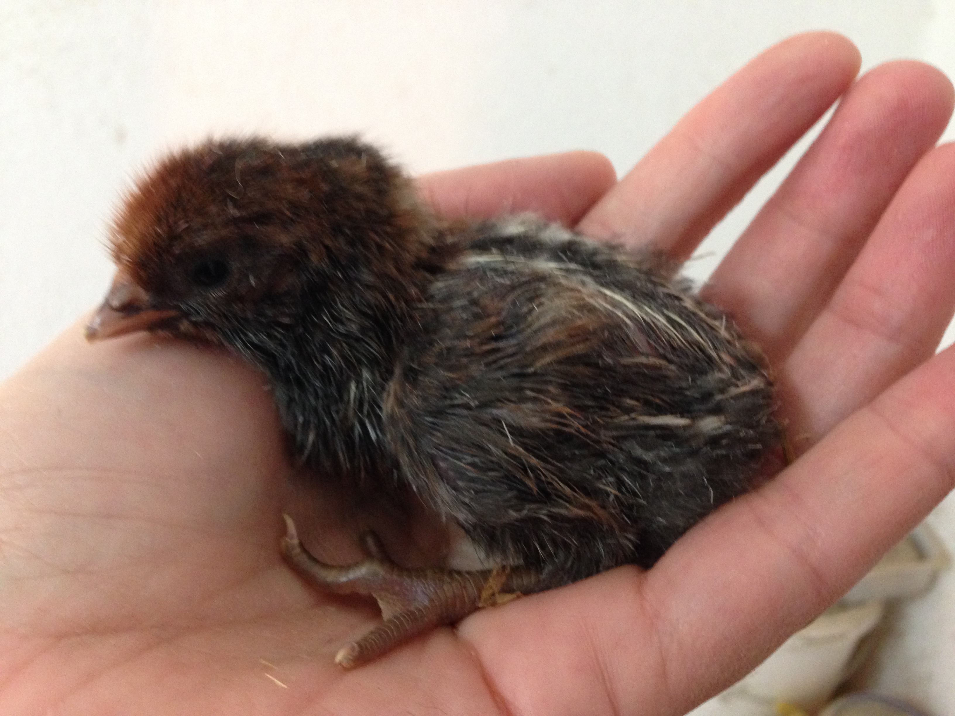 Krüperküken, schwarz-weißgedobbelt, Bargau, Schwäbisch Gmünd, Deutschland